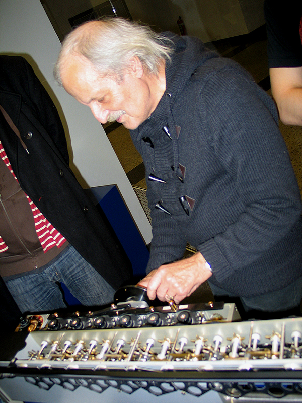 Dr. Ing. Franz Otto Kopp demonstriert das Hannoversche Modell 2005 der Leibnizschen Vier-Spezies-Rechenmaschine nach Gottfried Wilhelm Leibniz, hier in einem der Schauhäuser in der Passage im Erdgeschoss des Hauptgebäudes der Leibniz Universität Hannover während der Nacht, die Wissen schafft 2012 ...